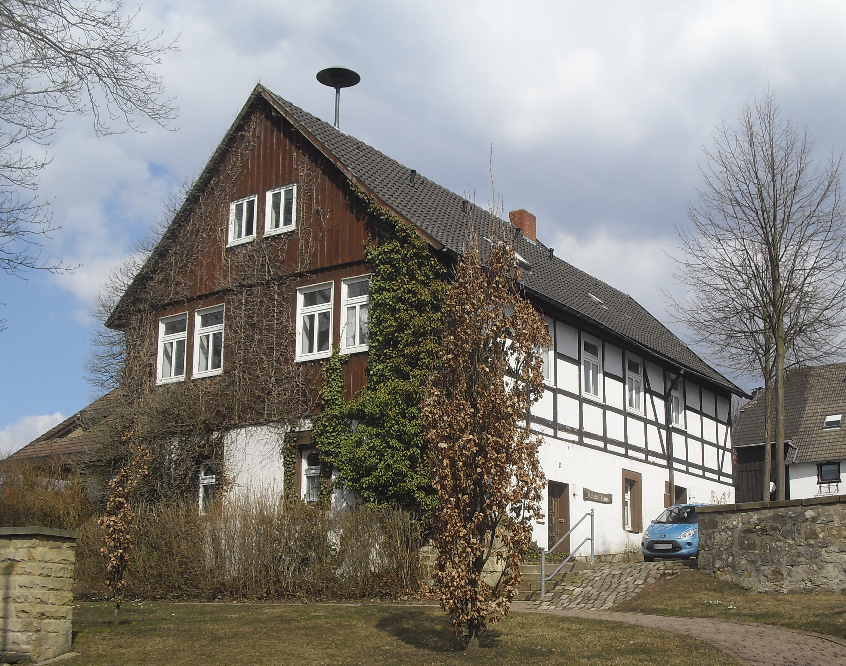 Kalandhaus in Neuenheerse This is the photograph of an architectural monument. It is part of the list of cultural monuments of Bad Driburg, no. A 23